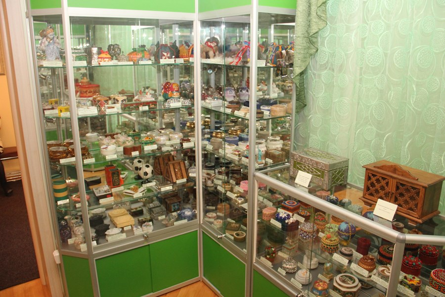 Открытие музея